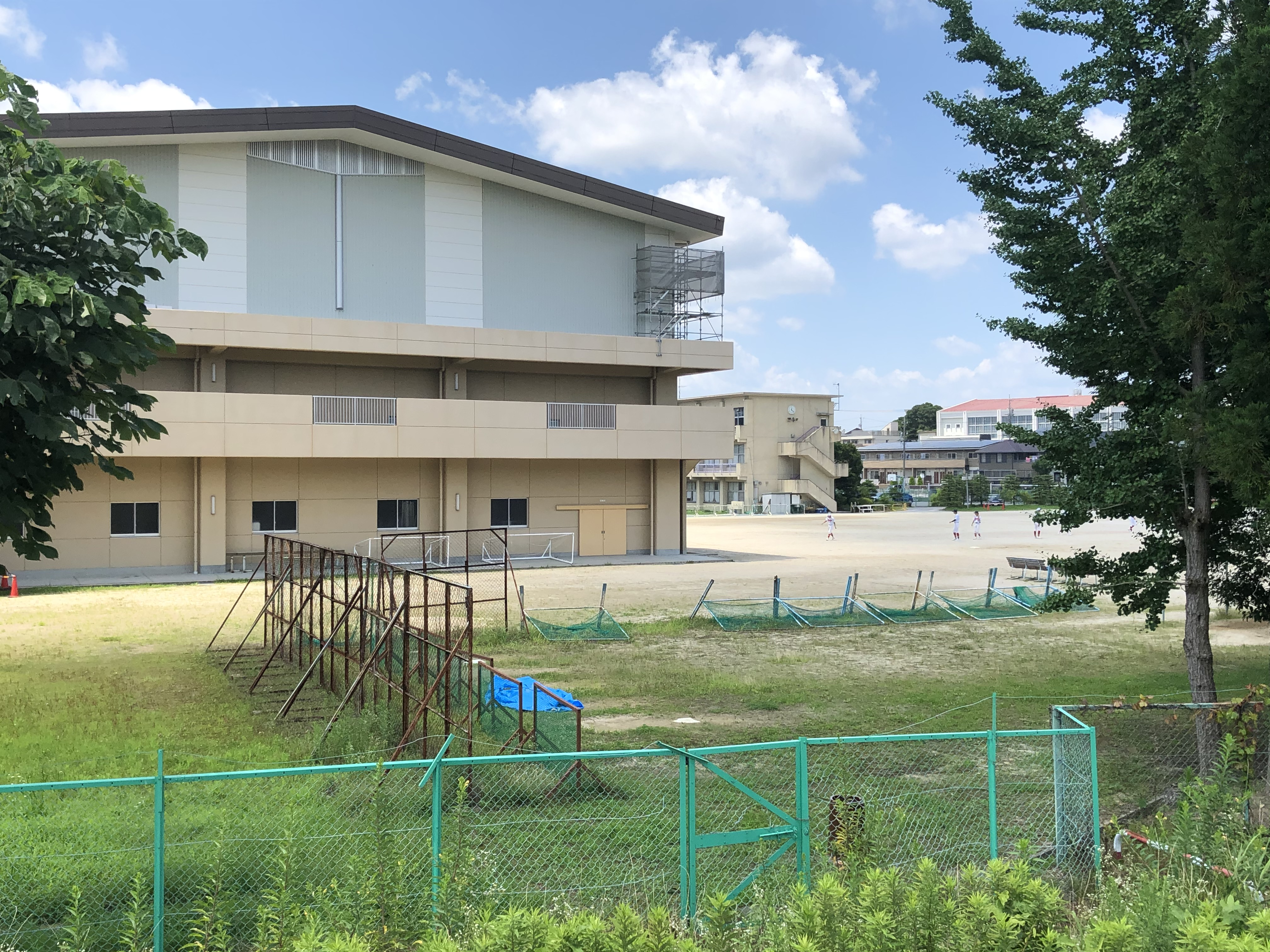 岡崎市立岩津中学校（岡崎市東蔵前）